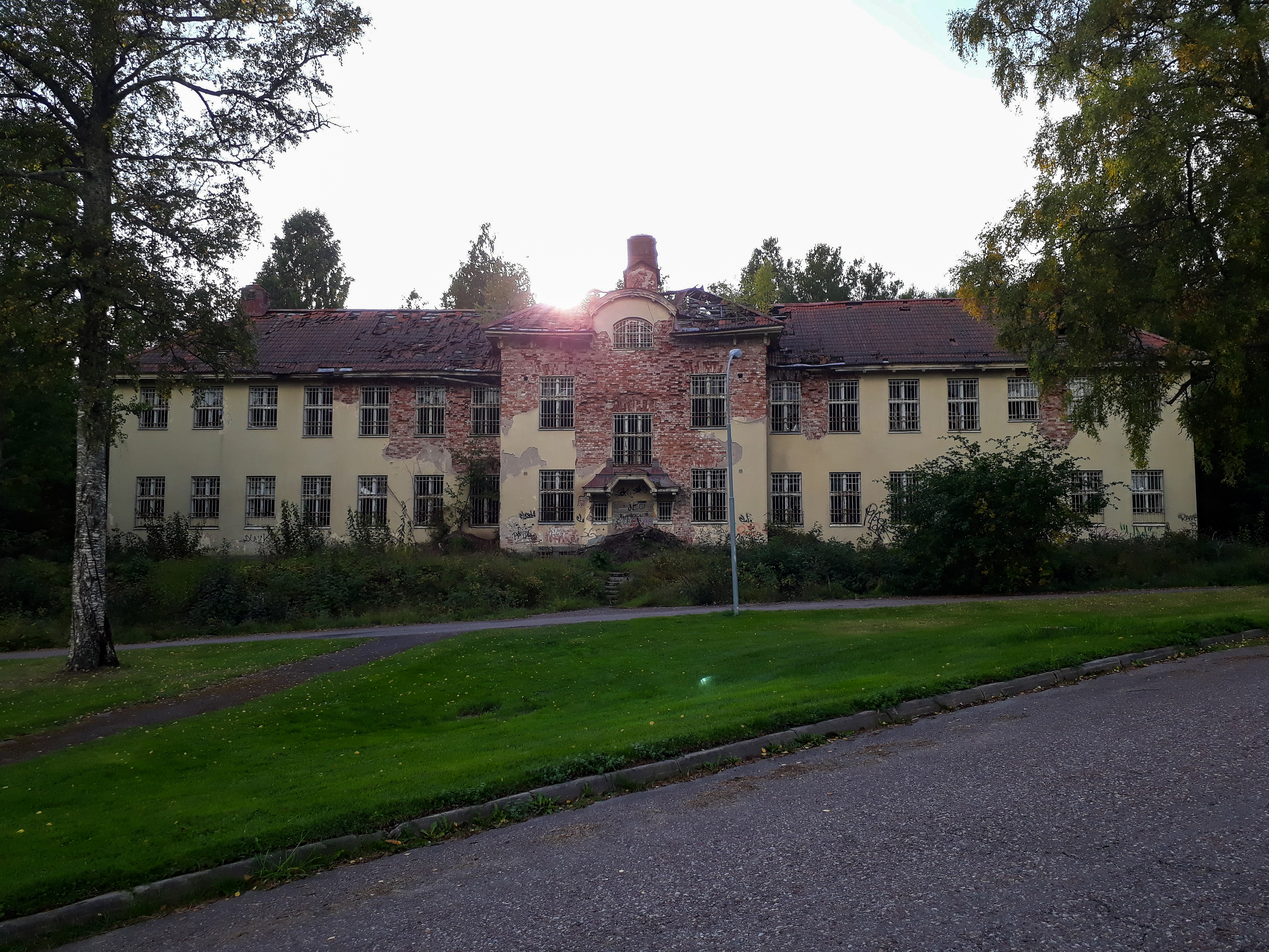 Ruinerna av Fasta paviljongen (Läns), Säters mentalsjukhus, Säter, Dalarnas län, Sverige